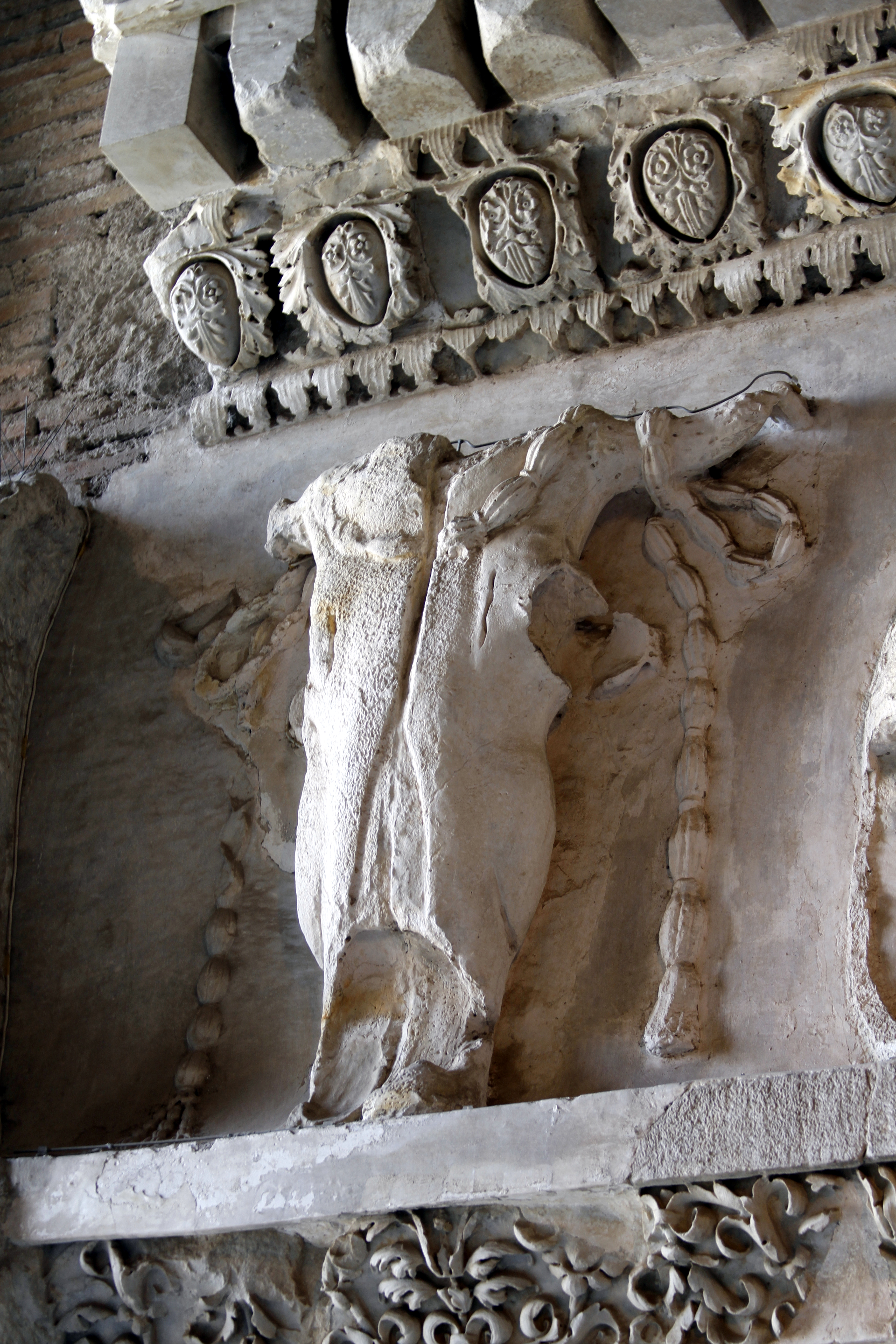 Tabularium - Rome